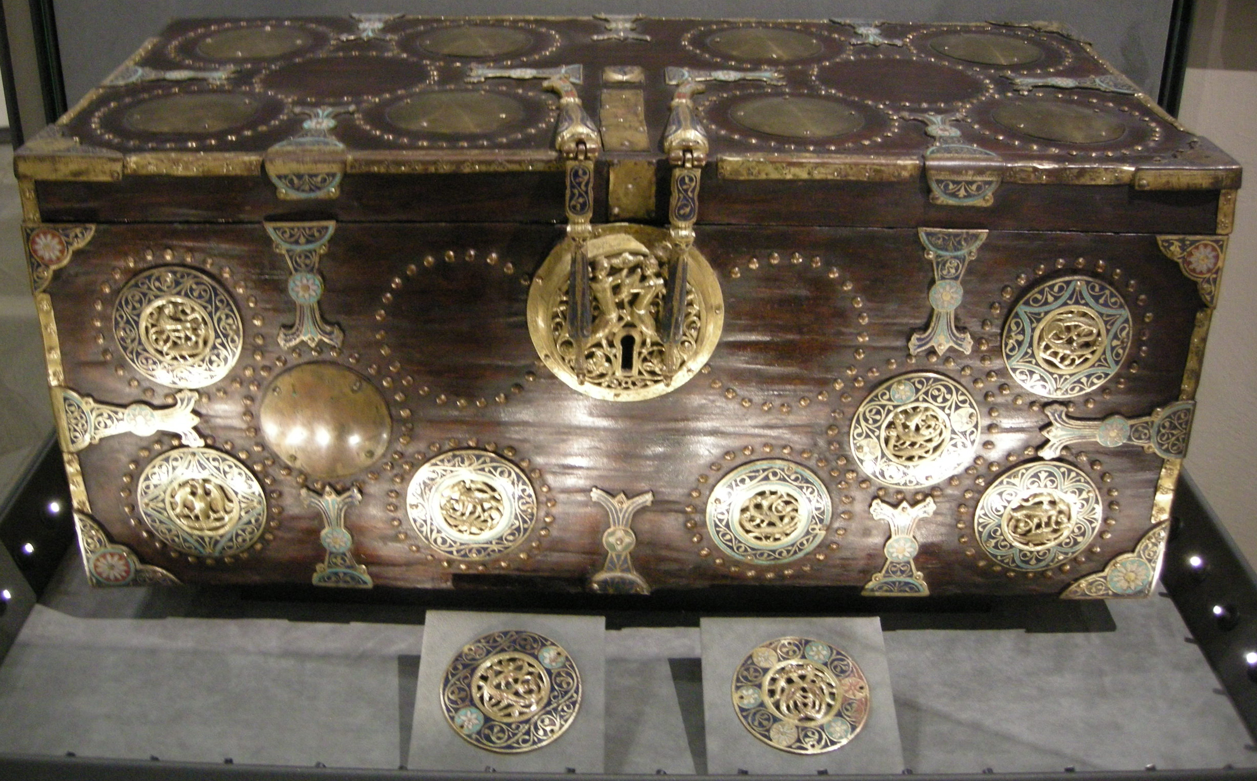 Museo civico di Torino. Orafo limosino: cofano del cardinale Guala Bicchieri con medaglioni, 1220-25.